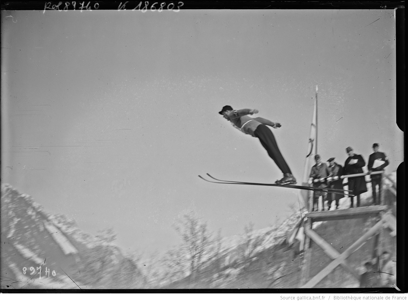 Chamonix, 4/2/24, Haug, Norvège [vainqueur du combiné nordique, saut à ski] : [photographie de presse] / [Agence Rol]